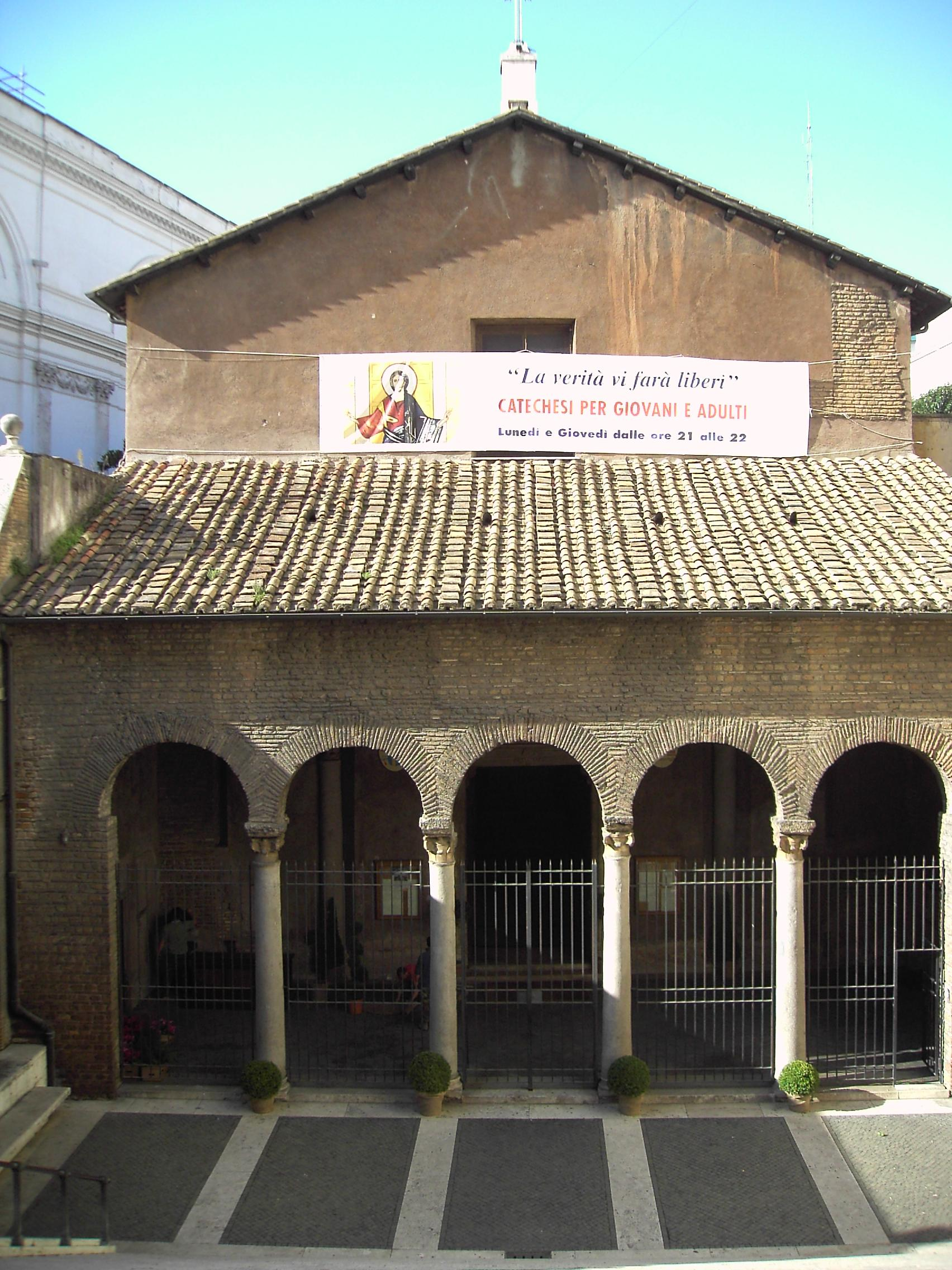 Roma, basilica di San Vitale (via Nazionale).